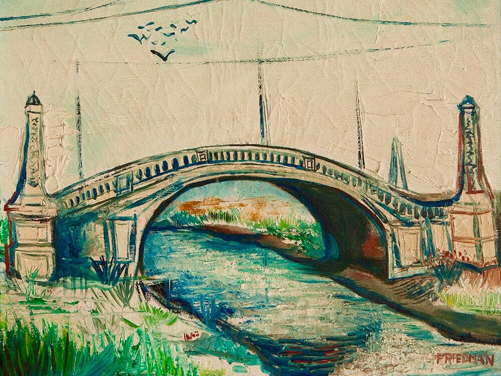 The Viaduct 1919 ( Exhibition of Modern Art / Bourgeois Galleries / New York )